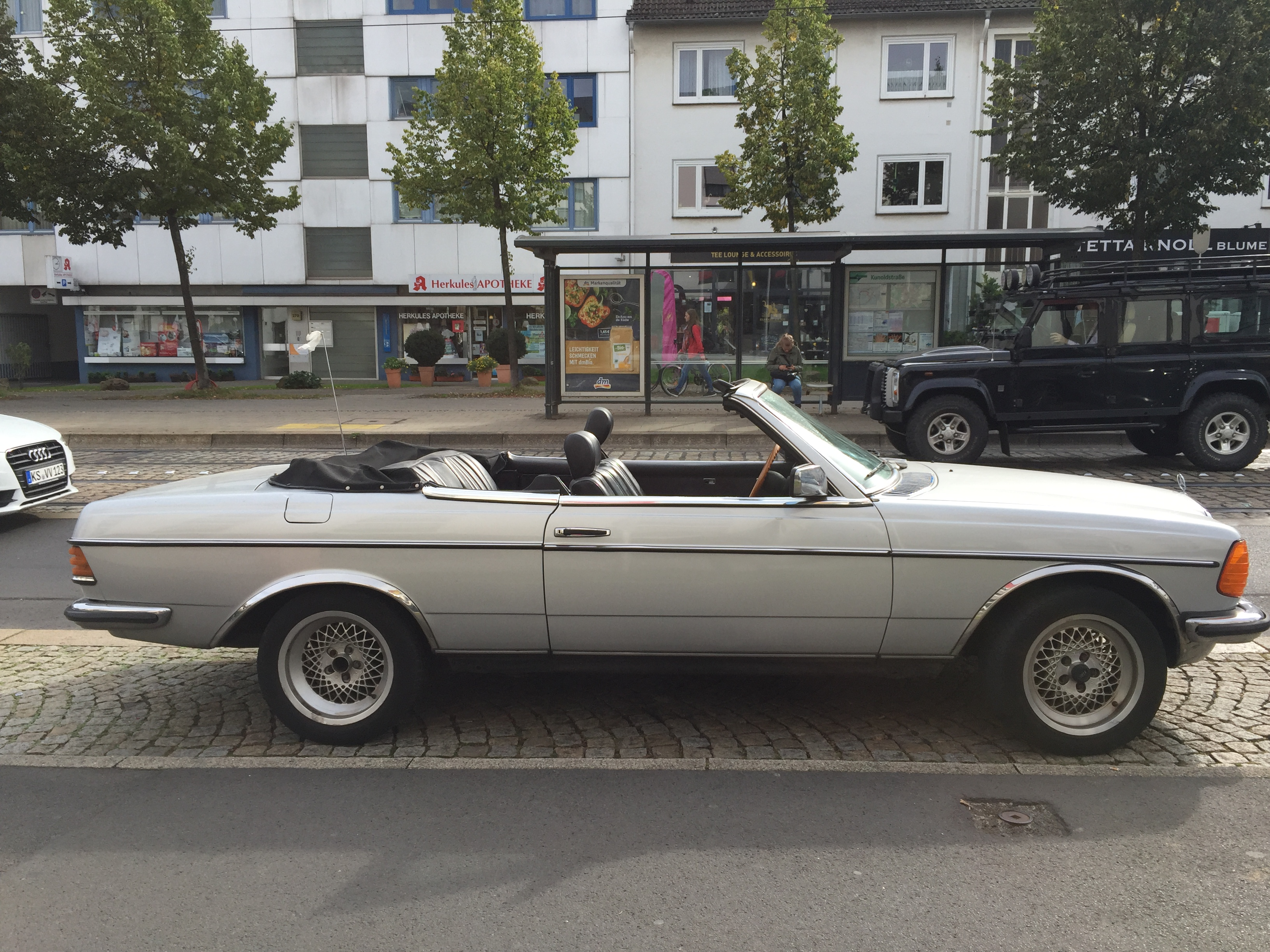 Mercedes-Benz W123 Cabriolet-Umbau